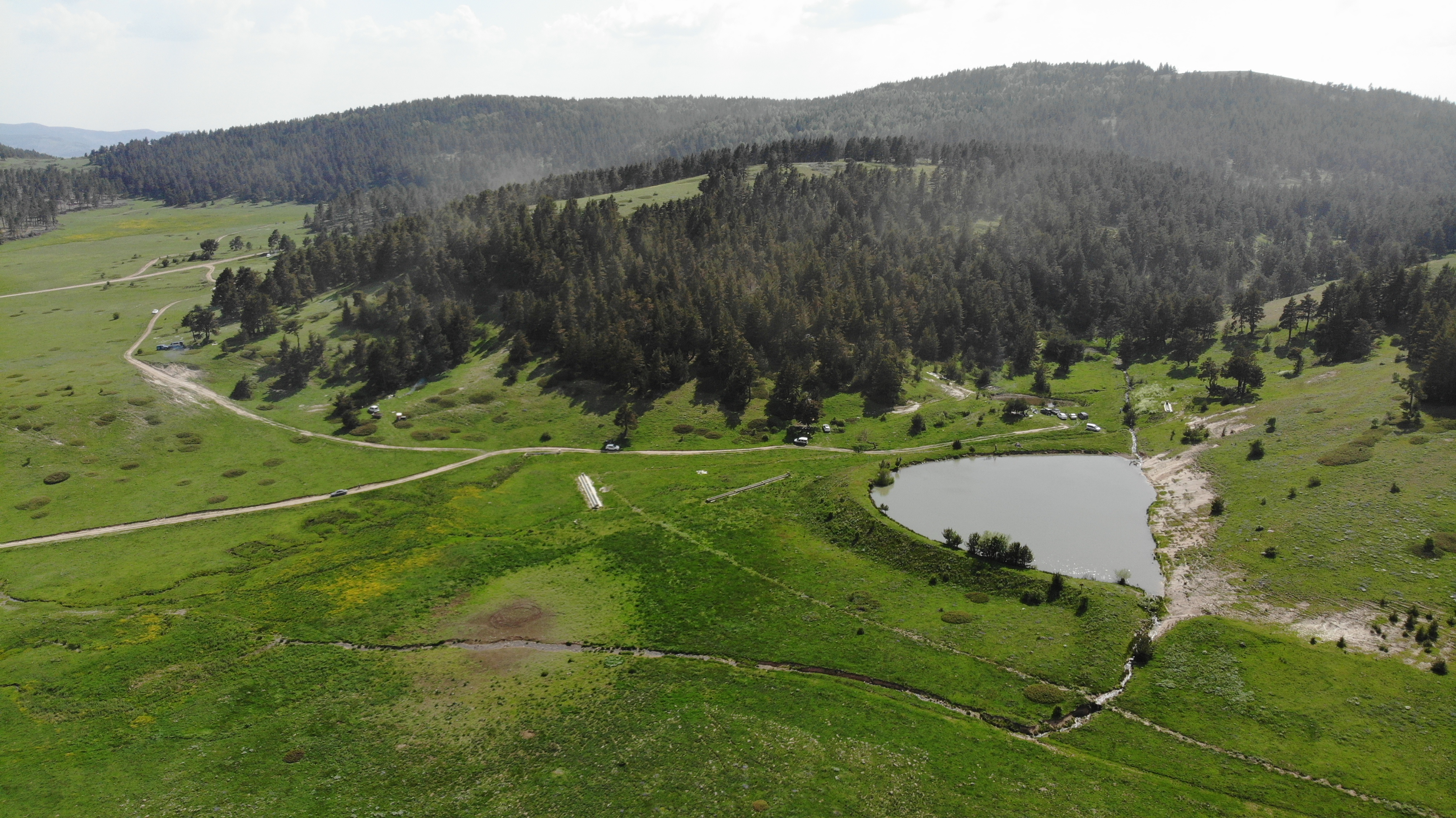 Köyün yaylasında bulunan gölet